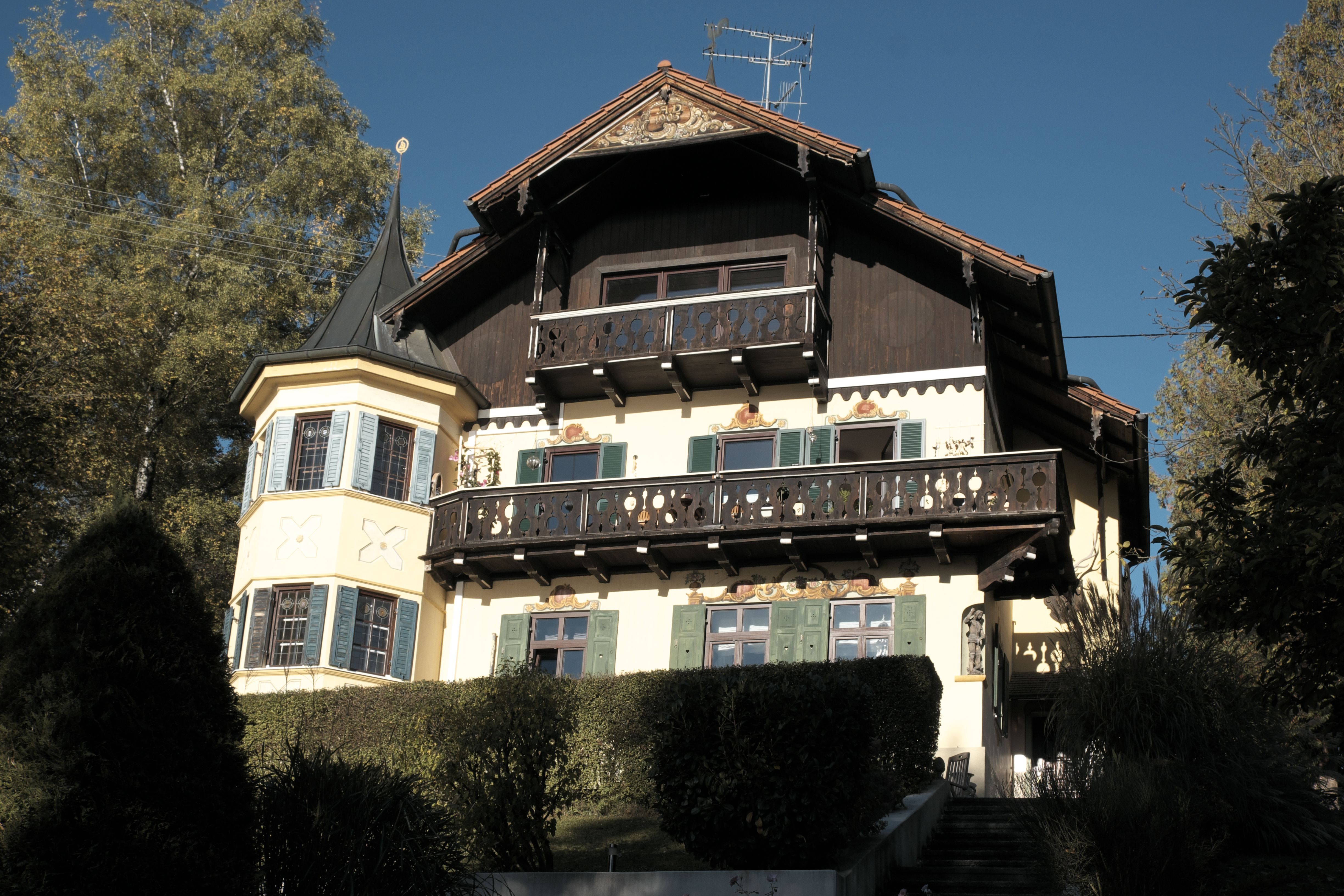 Landhaus in der Seestraße 12 in Unterschondorf (Schondorf am Ammersee) im Landkreis Landsberg am Lech (Bayern/Deutschland)